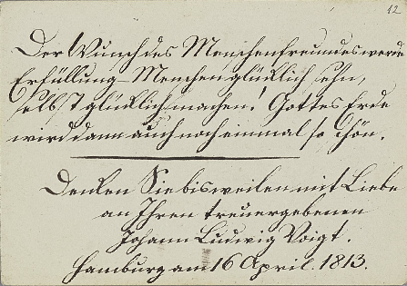 Eintrag von Joahhn Ludwig Voigt im Stammbuch von Nicolaus Heinrich Julius (1783-1862), Hamburg, Staats- und Universitätsbibliothek: Cod. in scrin. 222 d, 12r